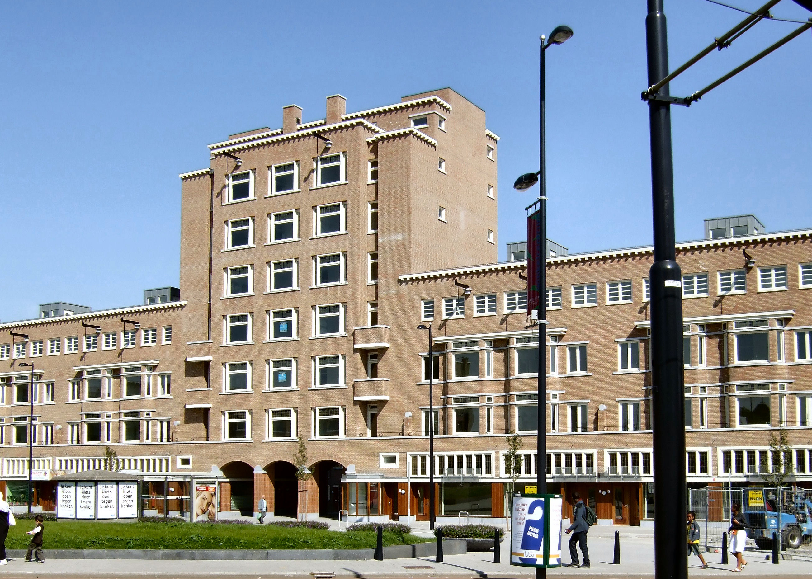 Mathenesserplein Oostzijde, 10 september 2006